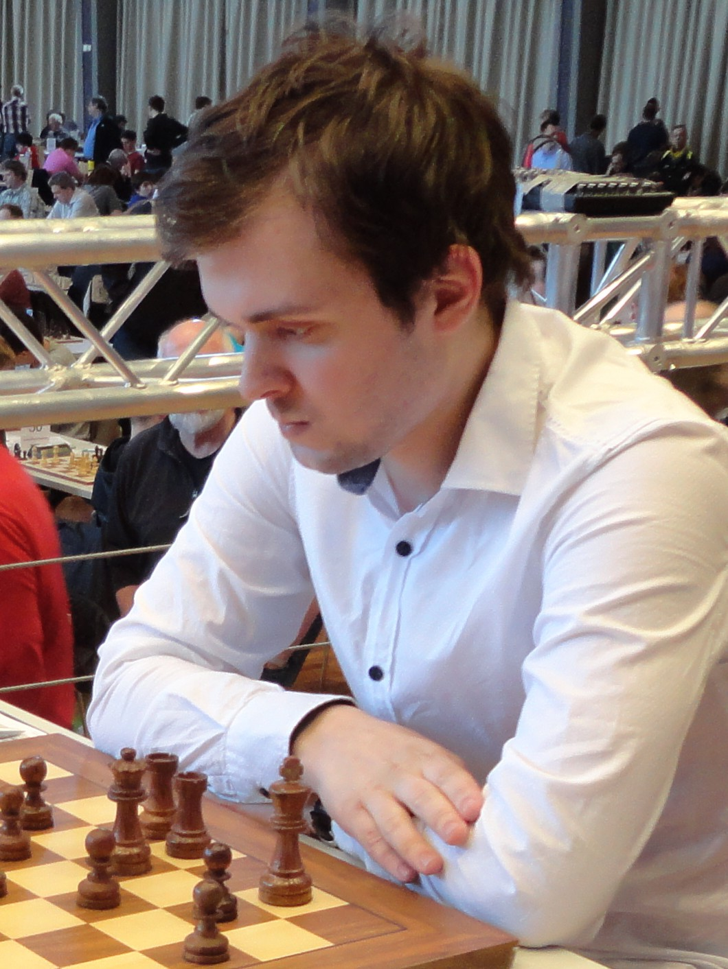 Vladimir Fedoseev, Grenke Chess Open 2016, Runde 9 in Karlsruhe.